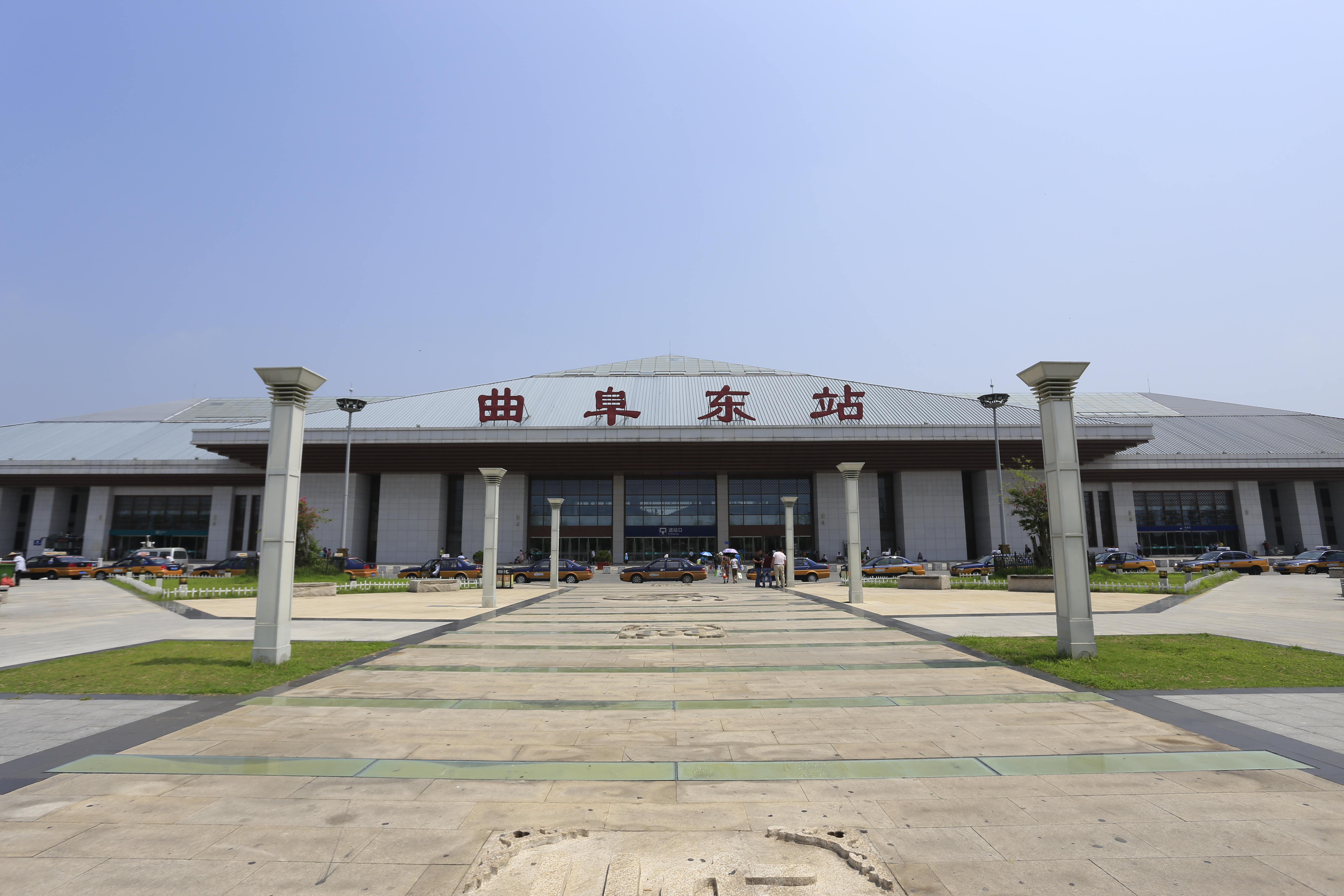 曲阜东站